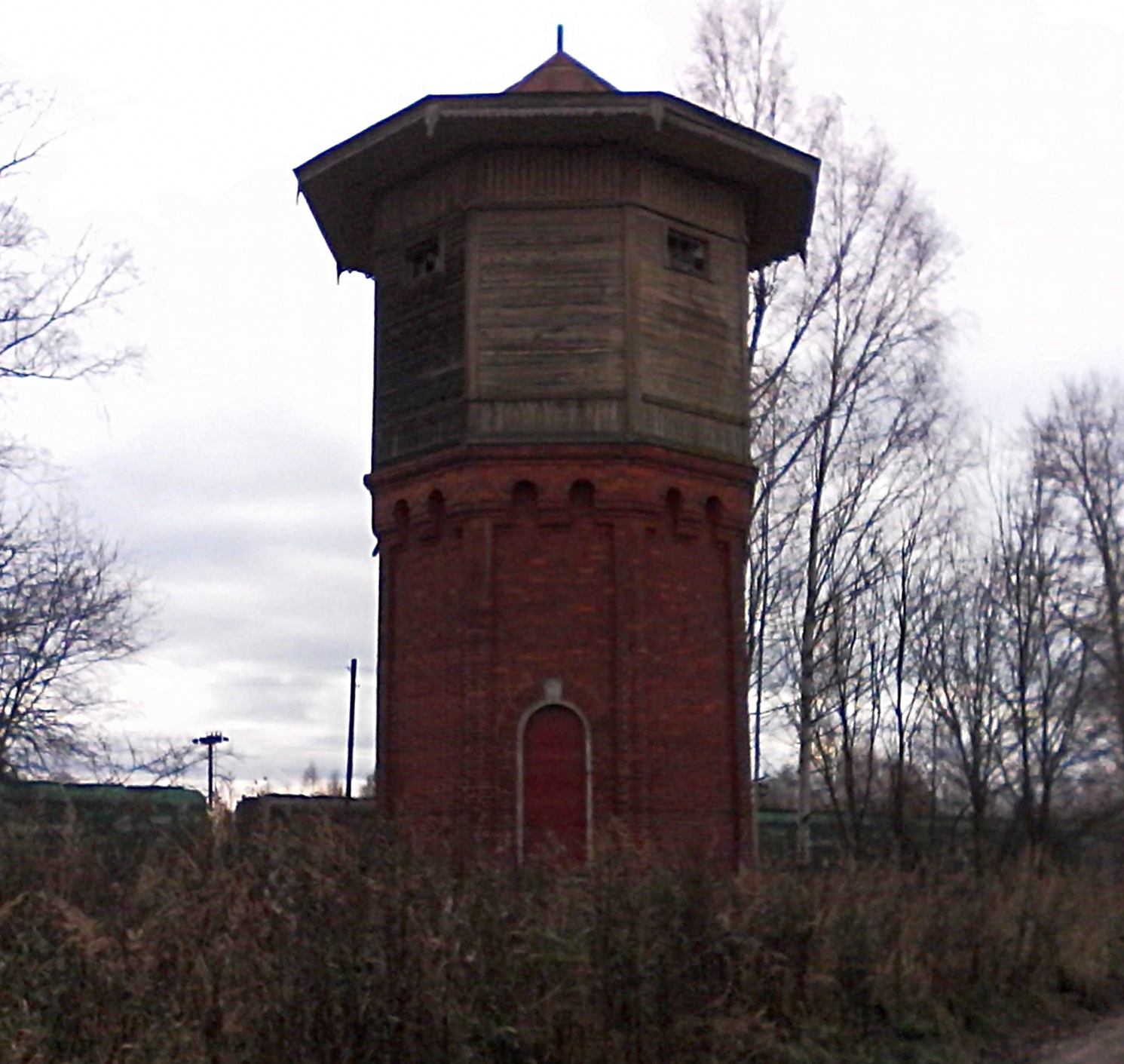 Водонапорная башня Рыбинско-бологовской железной дороги на станции Викторово. Октябрь 2017 года